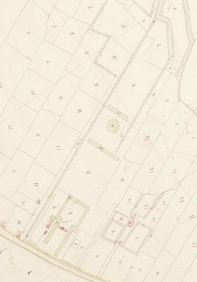 Emdaborg in het kadaster van 1832